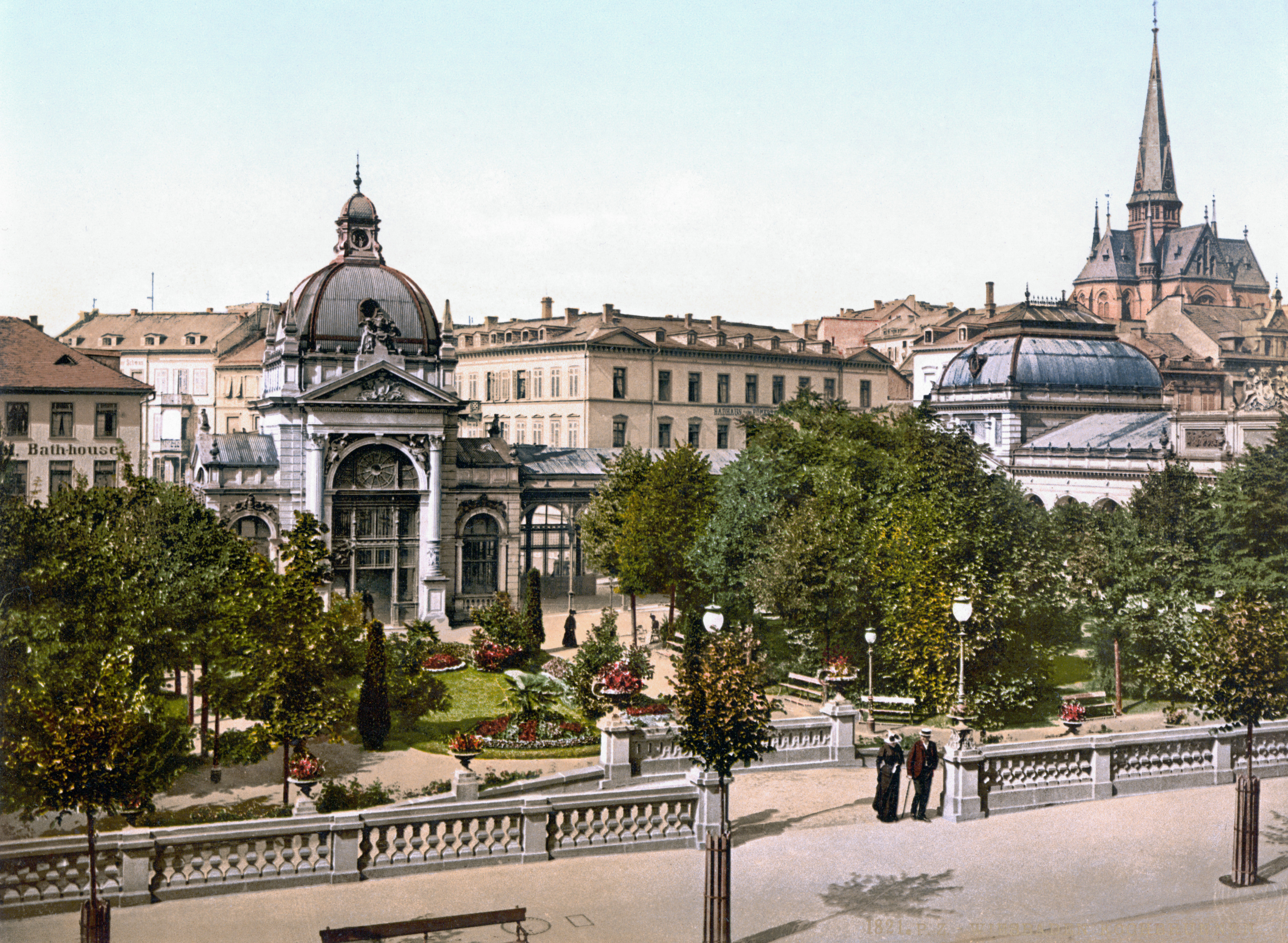 Kochbrunnen am Kochbrunnenplatz in Wiesbaden